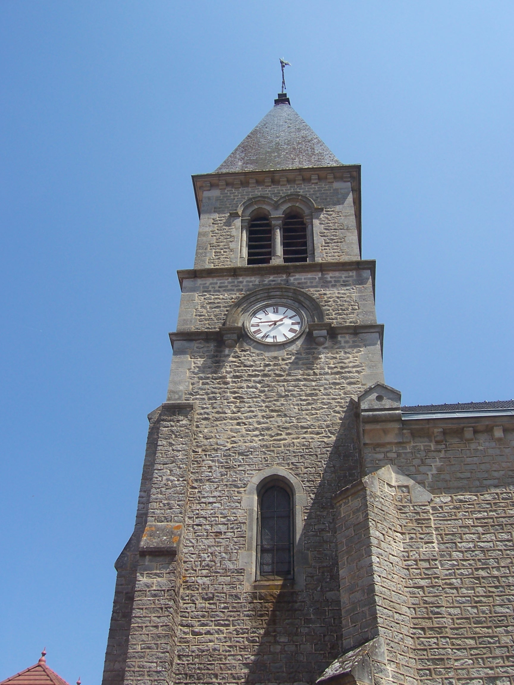 Eglise de Marizy